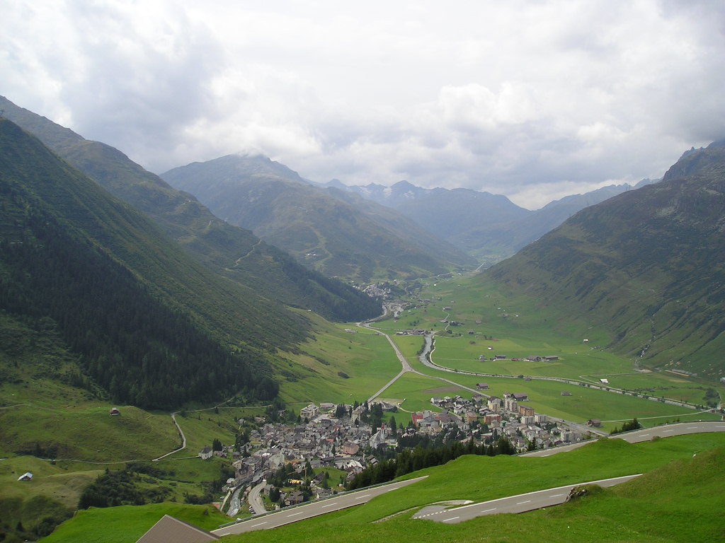 pohled ze svahu po kterém šplhá dráha do údolí s městečkem Andermatt